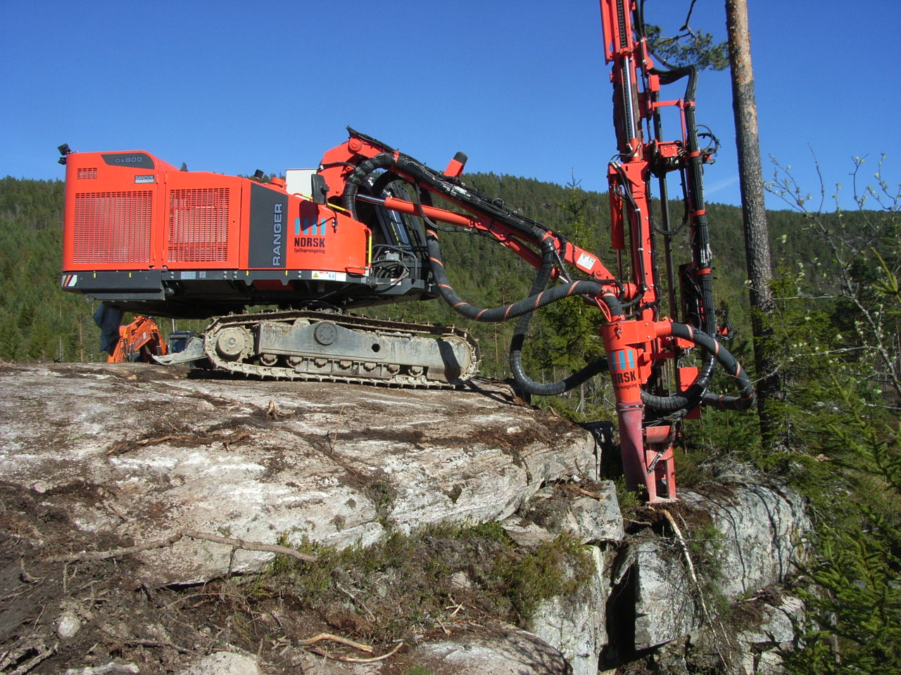 Ranger fjellborerigg i Drangedal